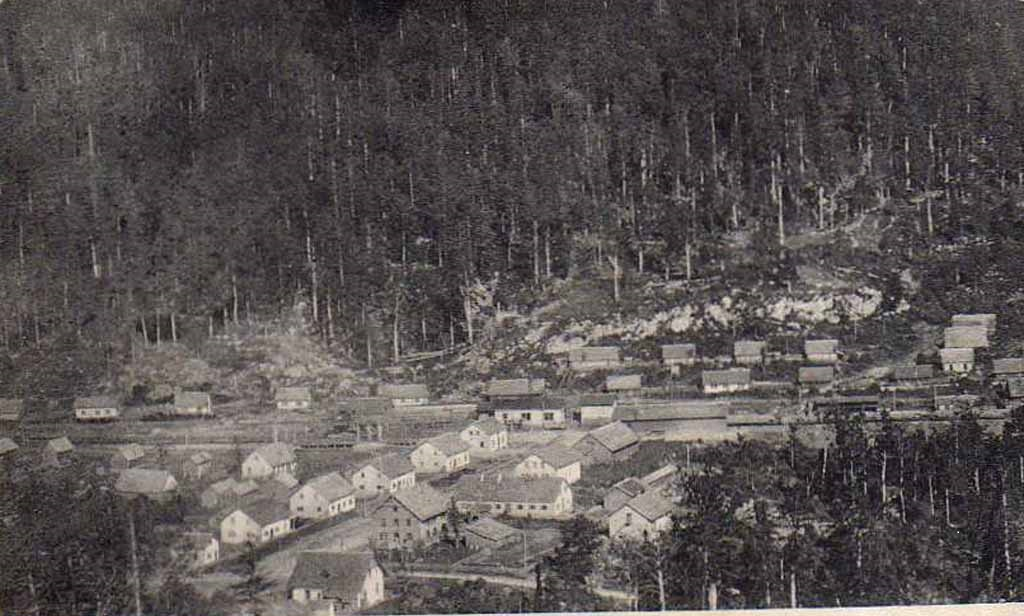 Ostreljj in den 1900er- oder 1910er-Jahren